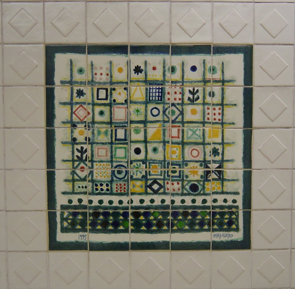 Painel de azulejos no metro de Paris Champs Elysées-Clemenceau.